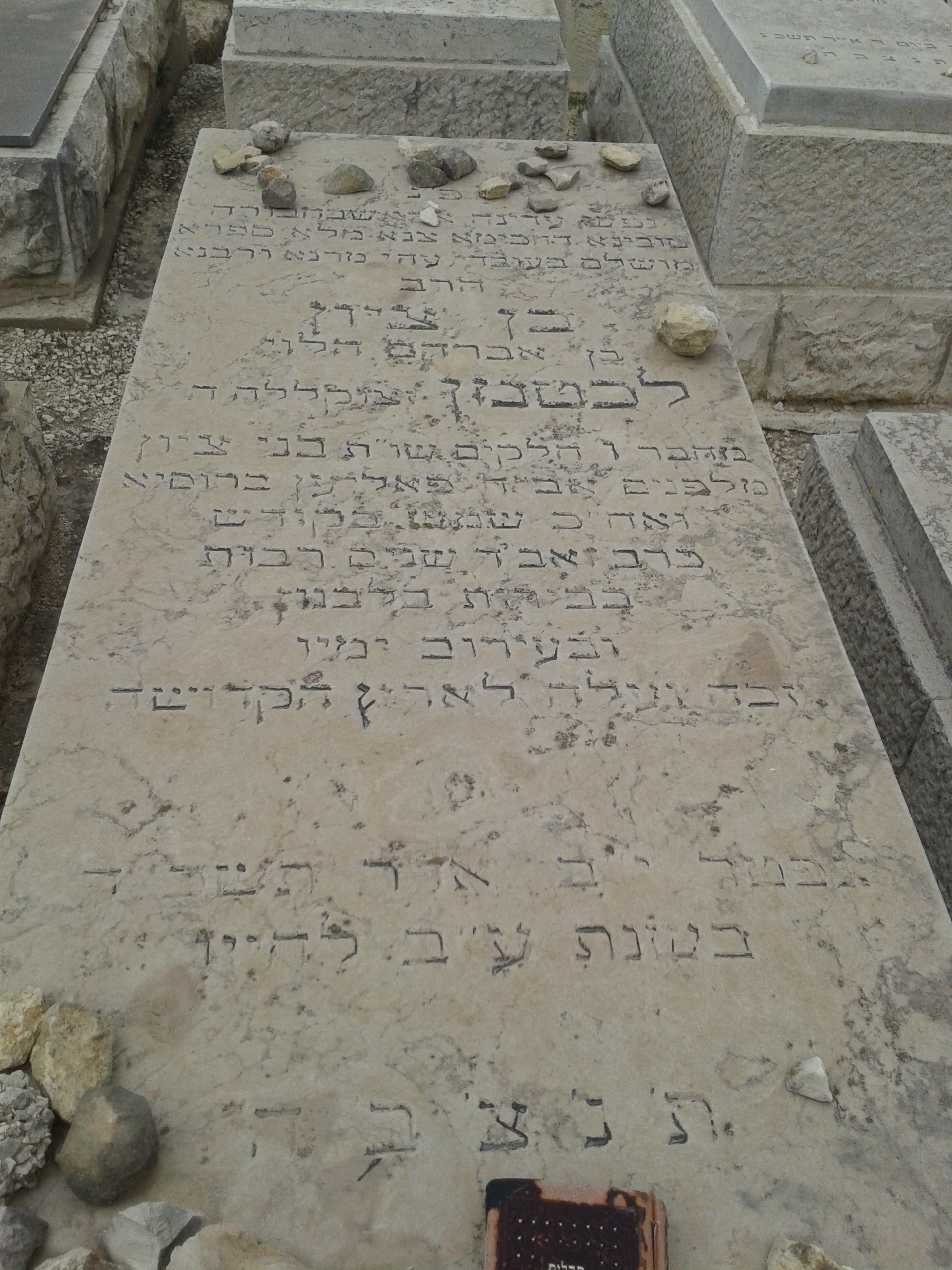 קברו של הרב בן ציון ליכטמן אב"ד בירות